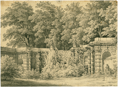 Christian Gottlob Hammer: Nimphen-Bad in seiner jetzigen Verfallenheit 1845 / Zwinger Garten in Dresden (1845)